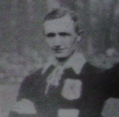 Cas Ruffelse, Nederlands voetbalinternational